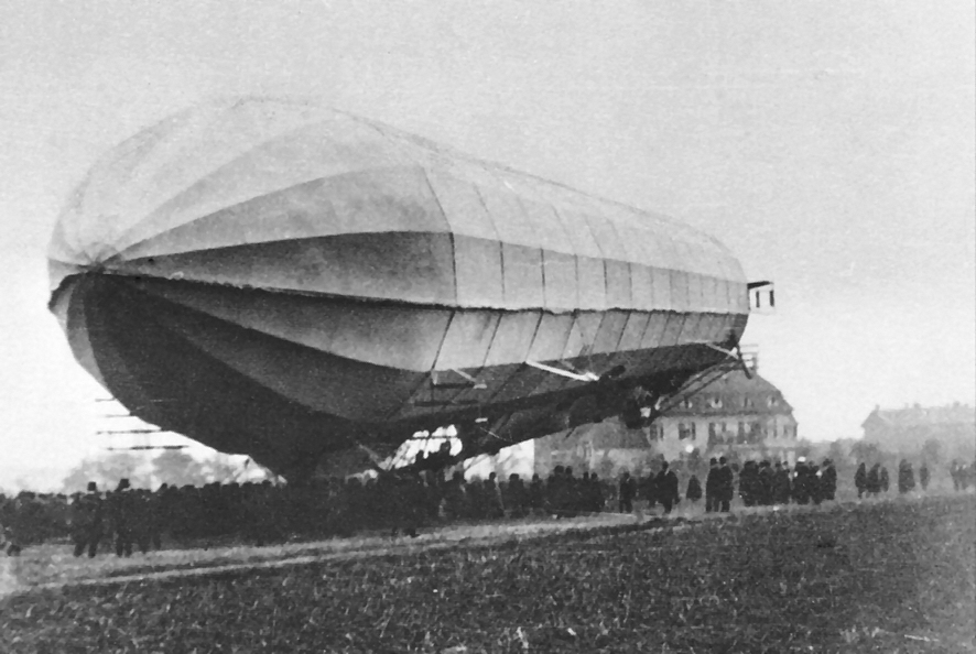 Landung des Luftschiffes Zeppelin LZ 6 am 20. September 1909 in Essen auf dem Gebiet des heutigen Grugaparks